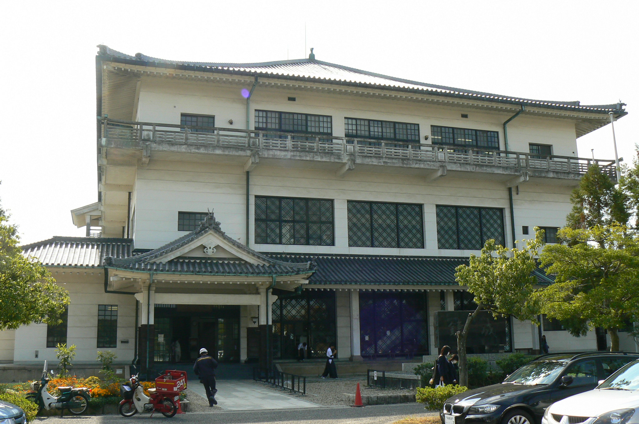 練成館(津島市）